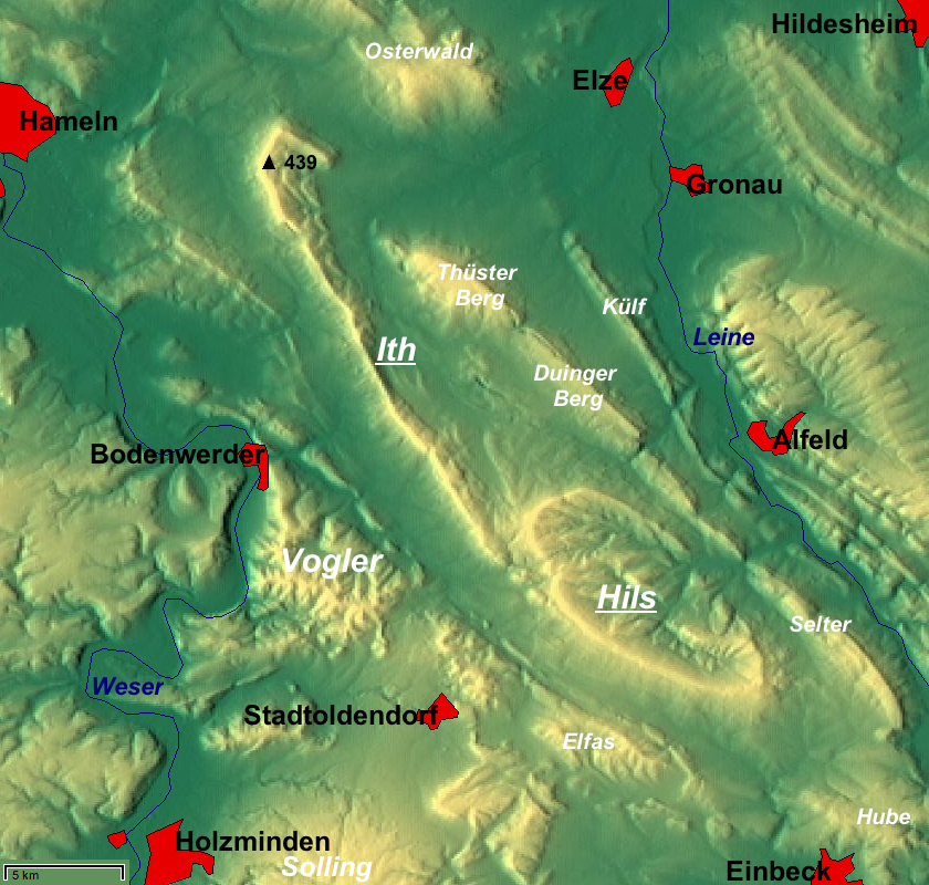 Weser-Leine-Bergland: Reliefkarte von Ith (mit Lauensteiner Kopf, 439 m) und Hils mit umgebenden Gebirgen/Höhenzügen; Niedersachsen, Deutschland. – Die Karte ist genordet, ein grober Maßstab ist unten links; zur Orientierung sind größere Städte und die beiden Flüsse Weser und Leine eingezeichnet.